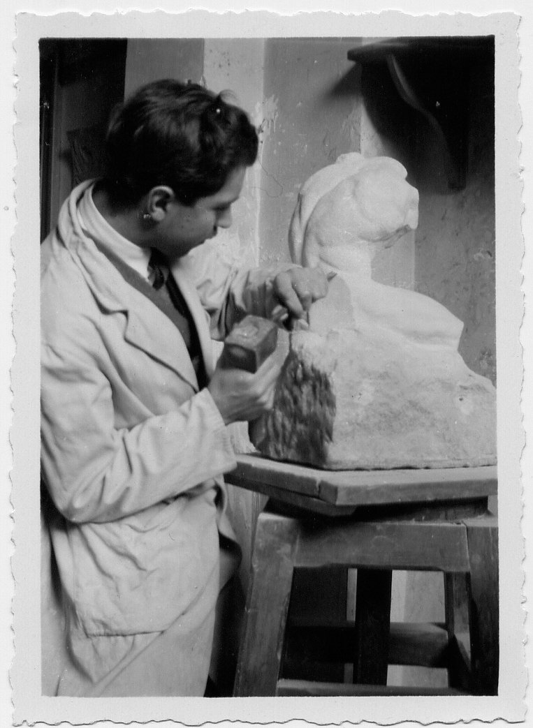 Le sculpteur René van Dievoet à l'oeuvre